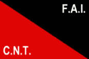 La bandiera rossonera utilizzata dalla CNT-FAI (confederaciòn nacionàl de los trabajadores - federaciòn anarquista iberica).